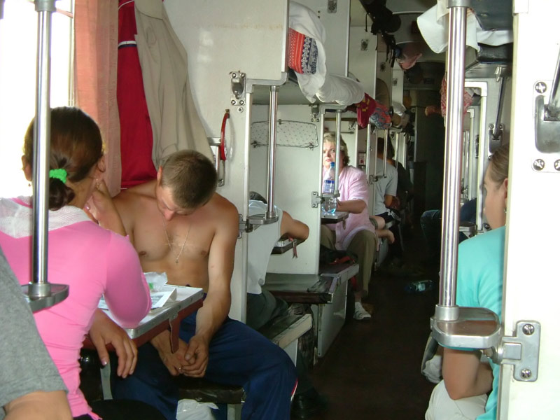 Couchette car in Ukraine Плацкартный вагон поезда в Украине